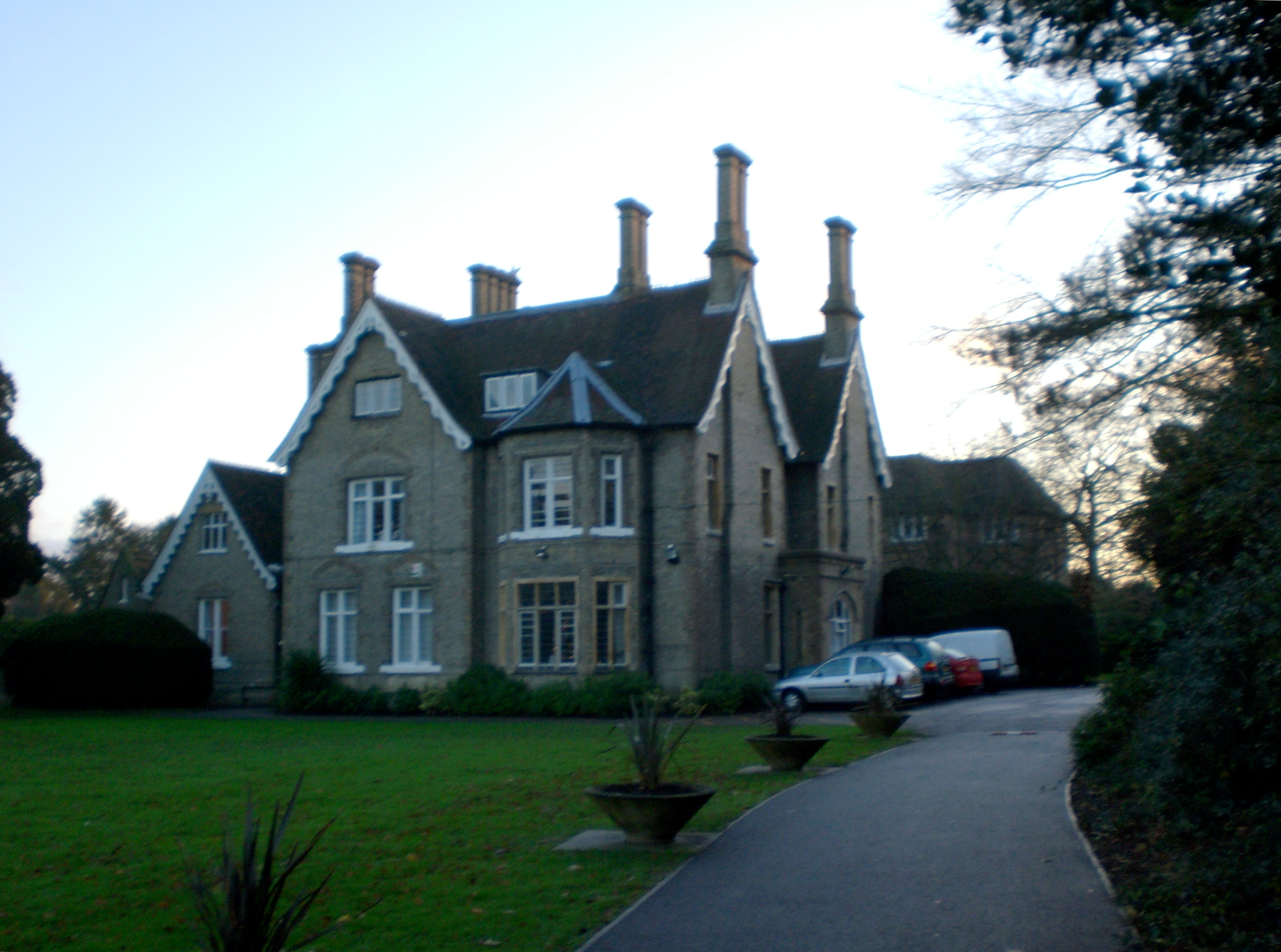 Thames House des Hockerill College, Bishop’s Stortford; Westansicht